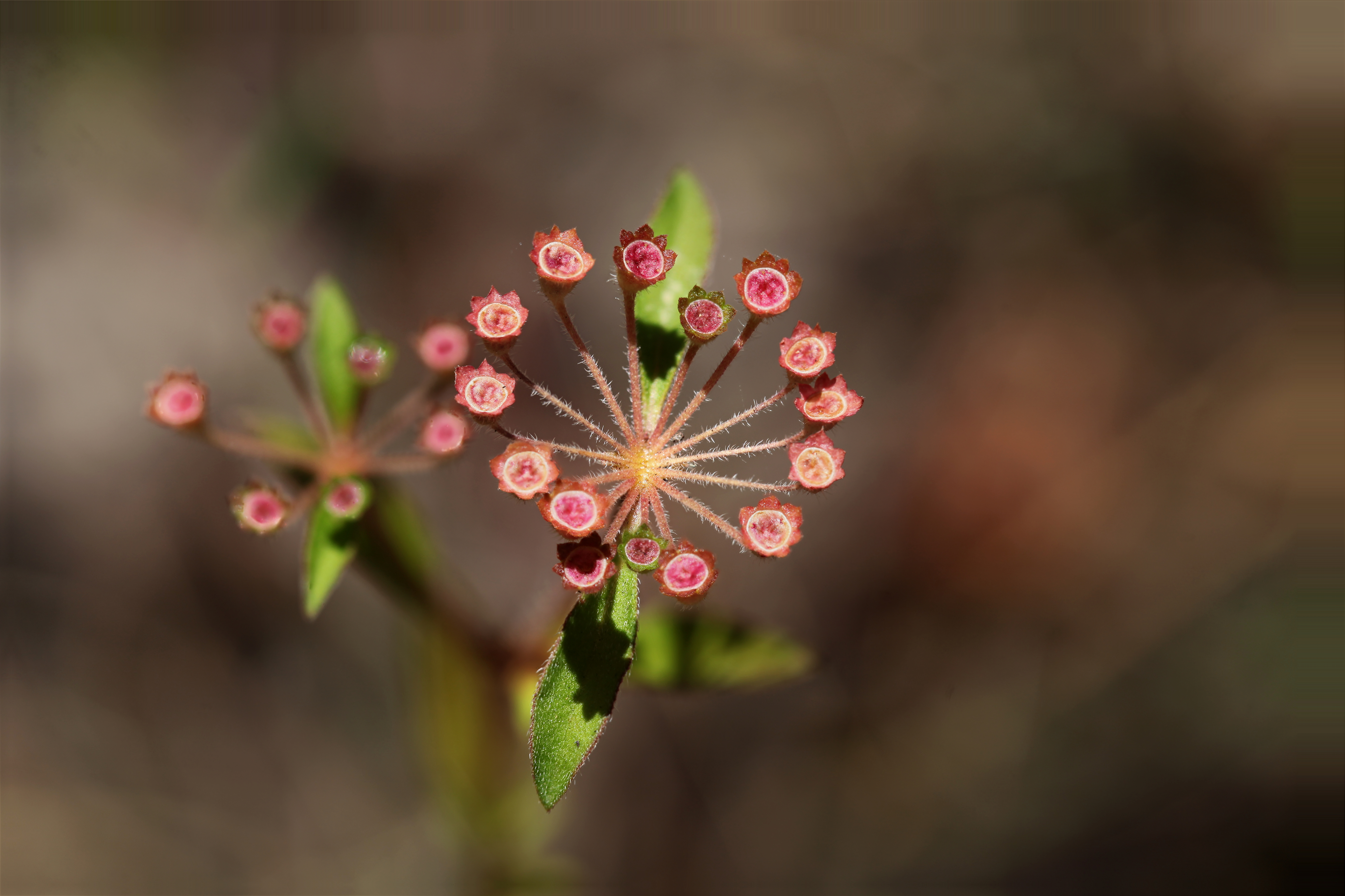 Found in Lane Cove National Park this tiny flower abounds along the edges of the tracks.